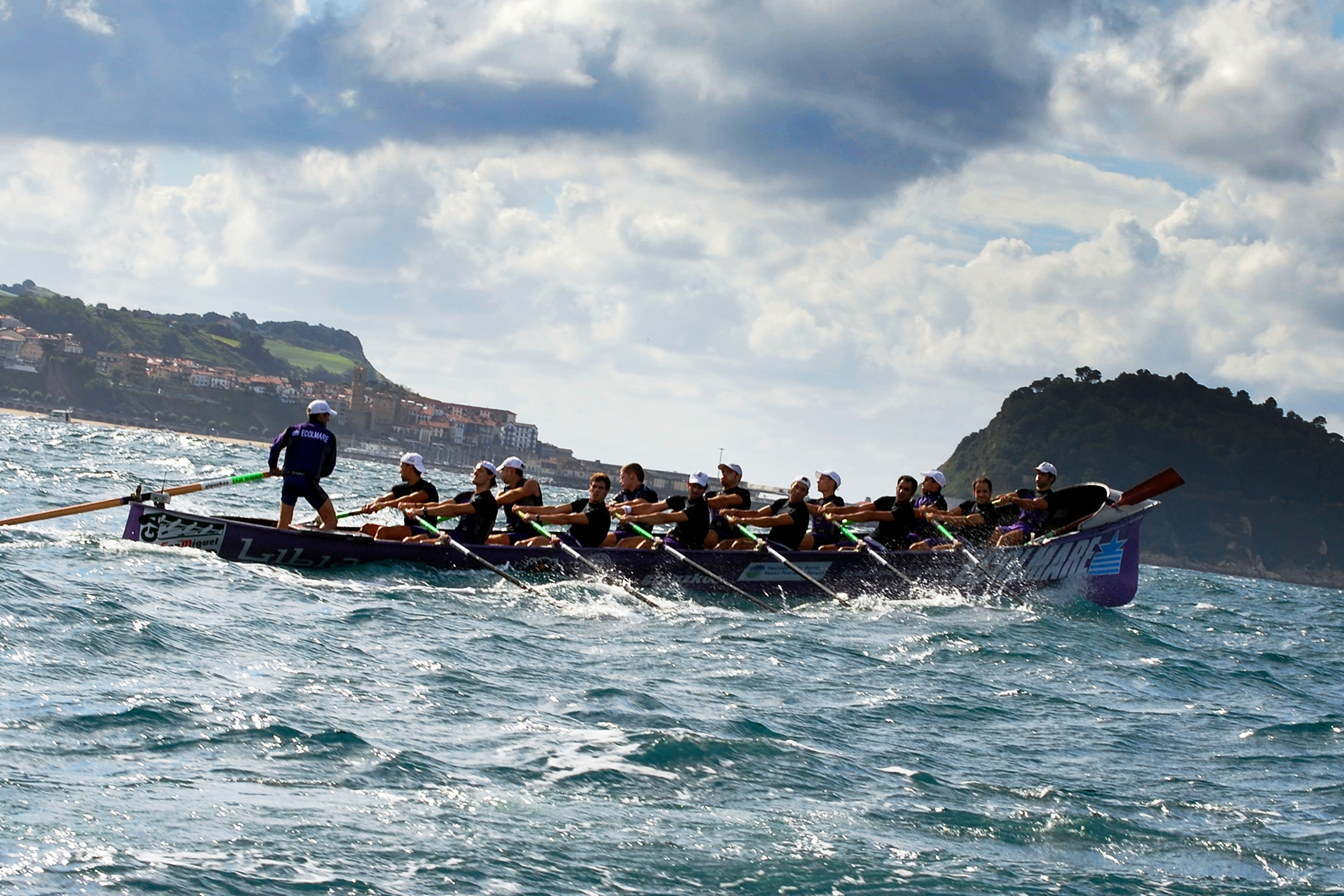 Trainière la Libia en compétition lors du Drapeau de Zarautz (2010).